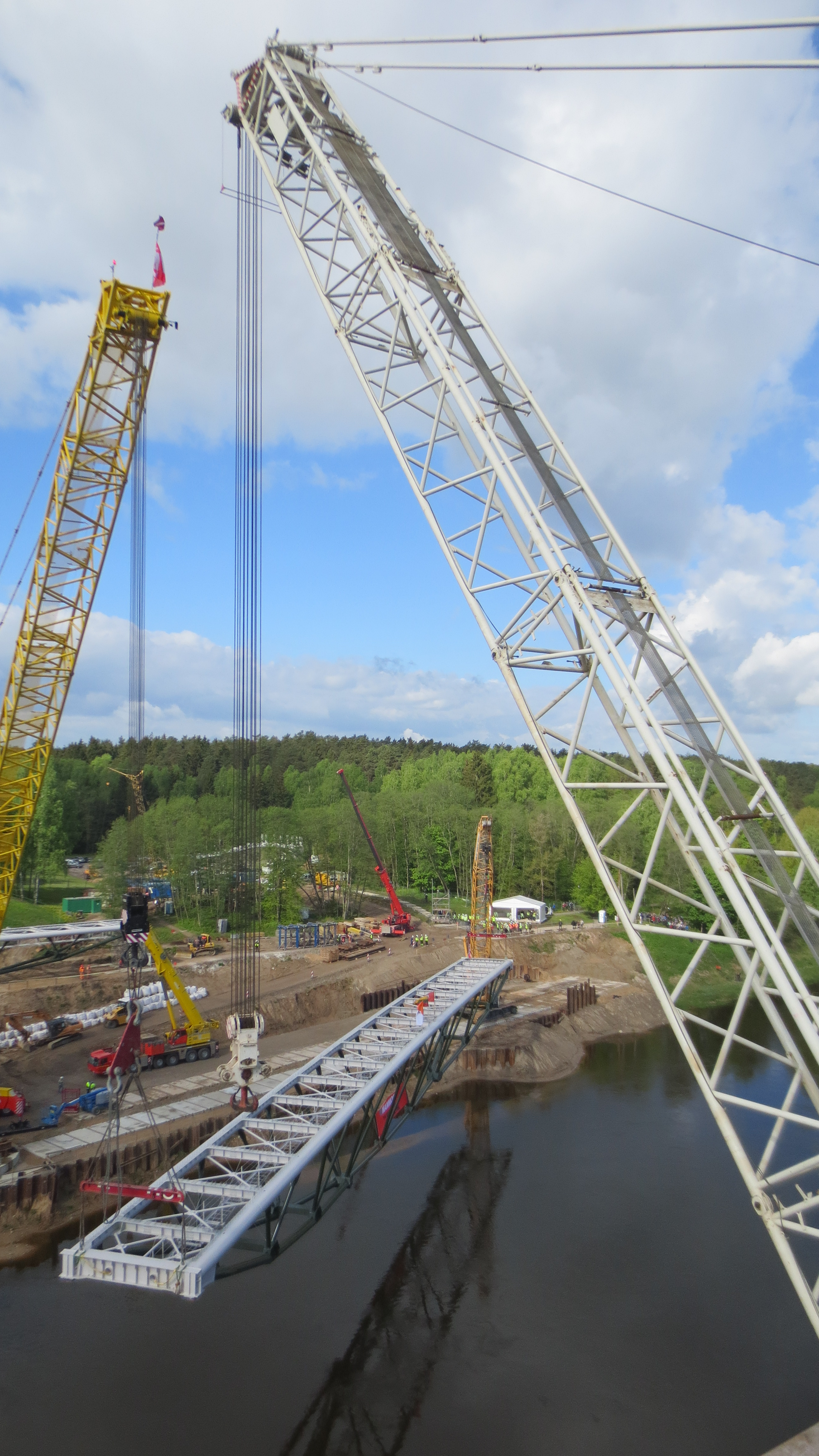 Centrinio tarpatramio perdangos konstrukcijos užkėlimas ant atramų